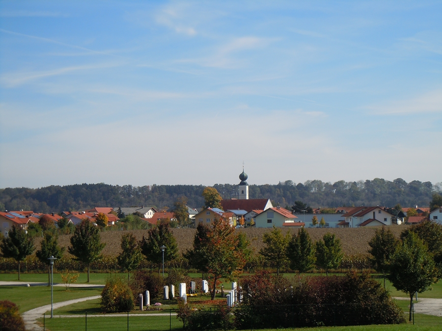 Tacherting von Westen, Blick über Gemeindefriedhof zur Ortsmitte